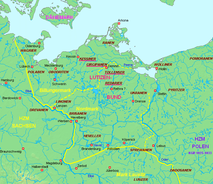 Der Lutizenbund (983-1056/57). Grenzziehung angelehnt an Atlas zur Geschichte I, Haack Gotha 1973, S. 24. Stämme nach J. Herrmann et al., Die Slawen in Deutschland, Berlin 1985, Einbandskarte. Topographische Grundkarte (Küstenlinien, Flüsse, Höhen) von demis (gemeinfrei [1])